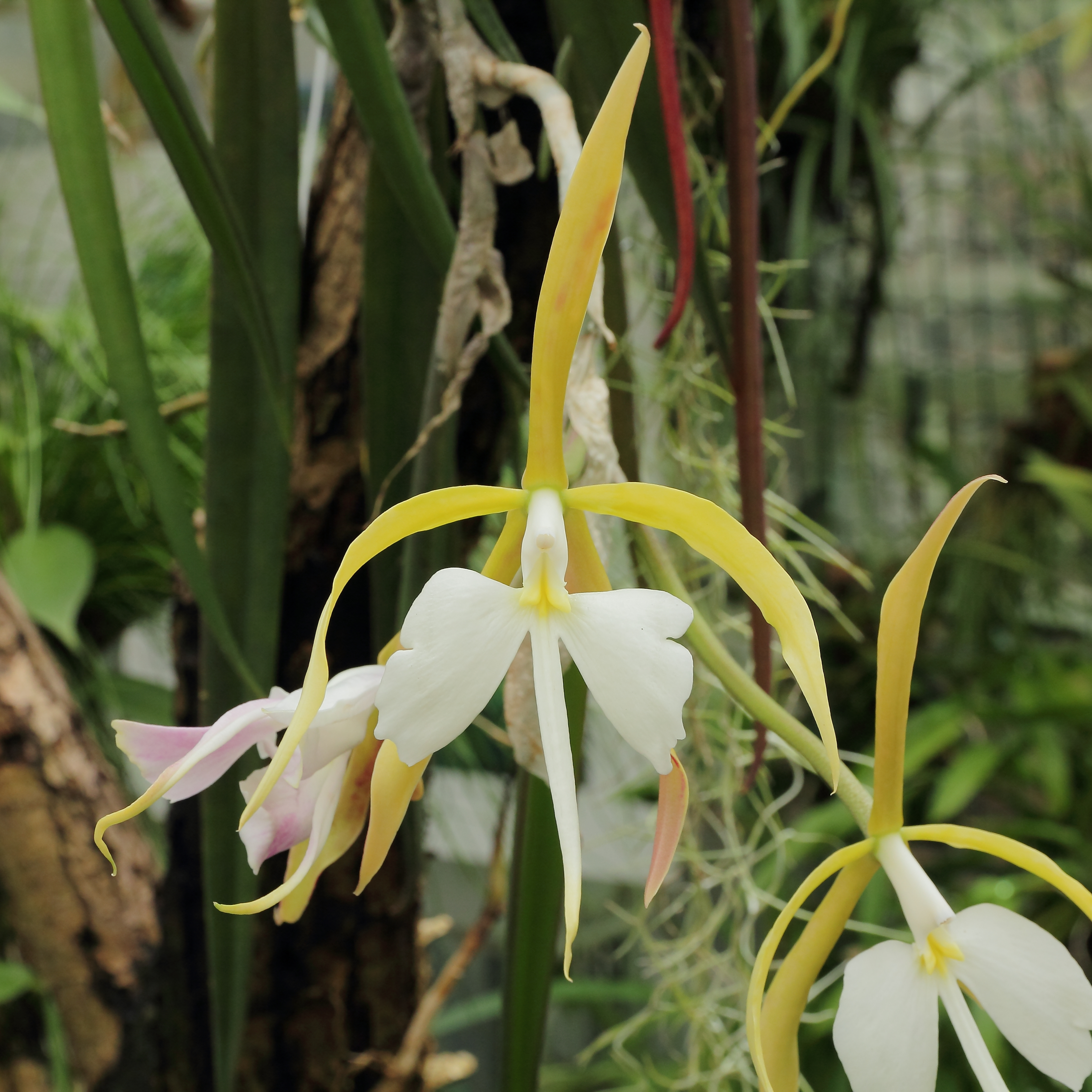 Epidendrum falcatum i Göteborgs Botaniska Trädgård.